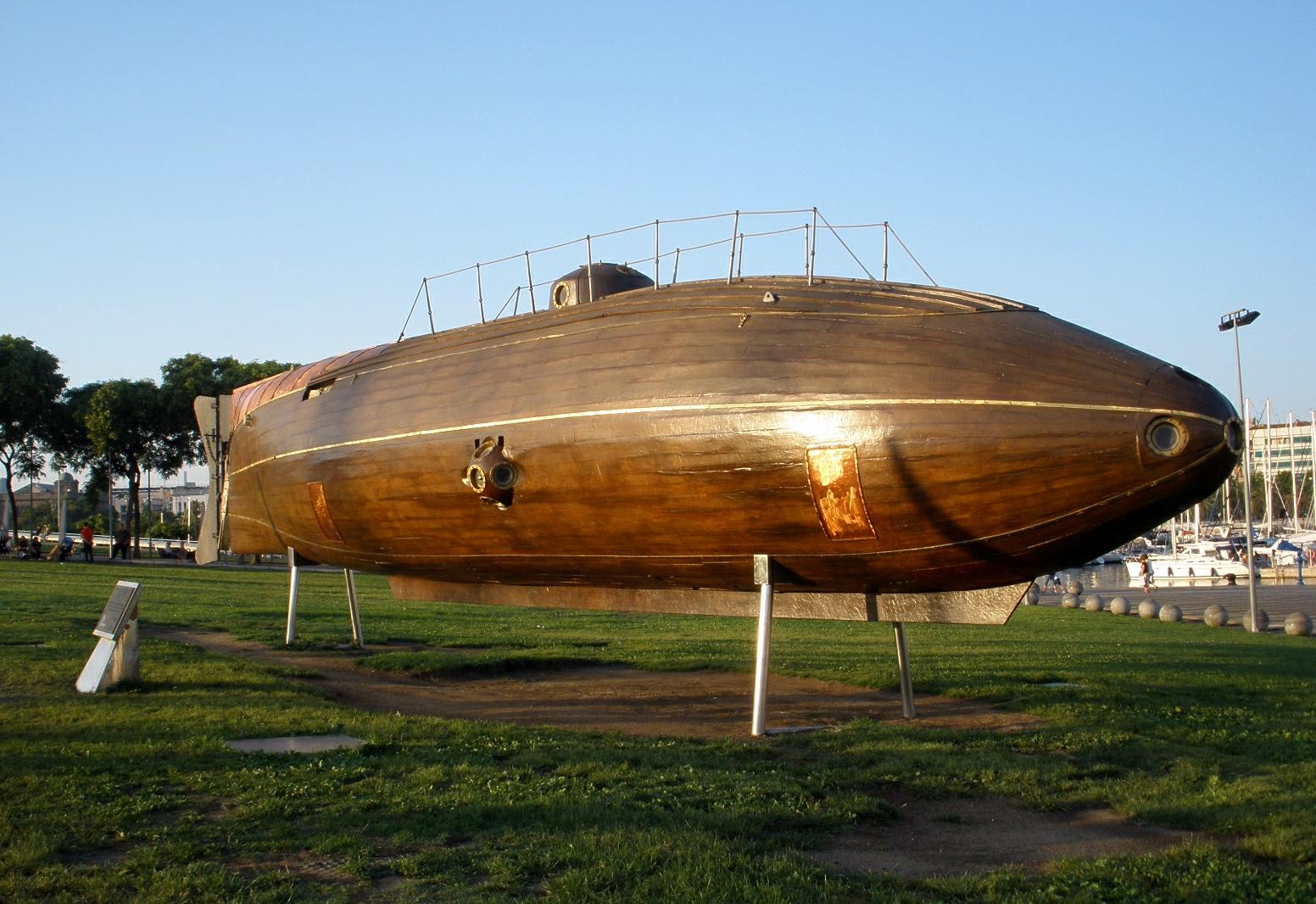 Réplica (1992) del submarino Ictineo II (1862) de Narcís Monturiol, en Barcelona